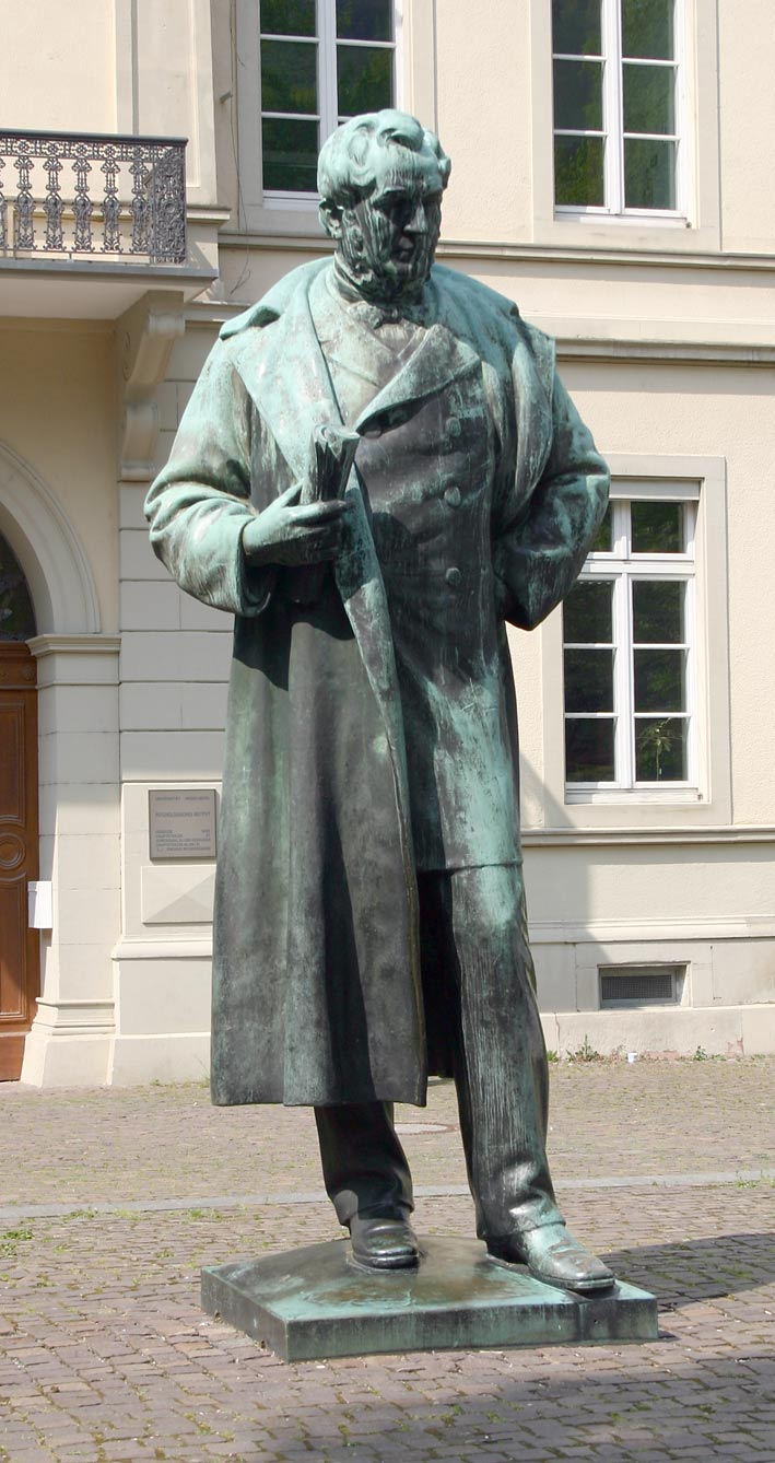 Denkmal Robert Wilhelm Bunsens in Heidelberg von Hermann Volz